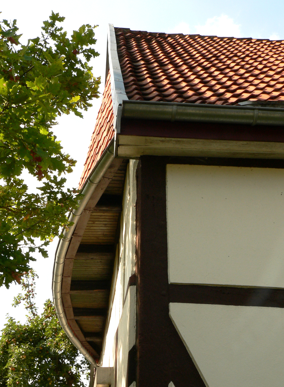 Schaumburger Mütze in Kleinenbremen, Altbau, von unten